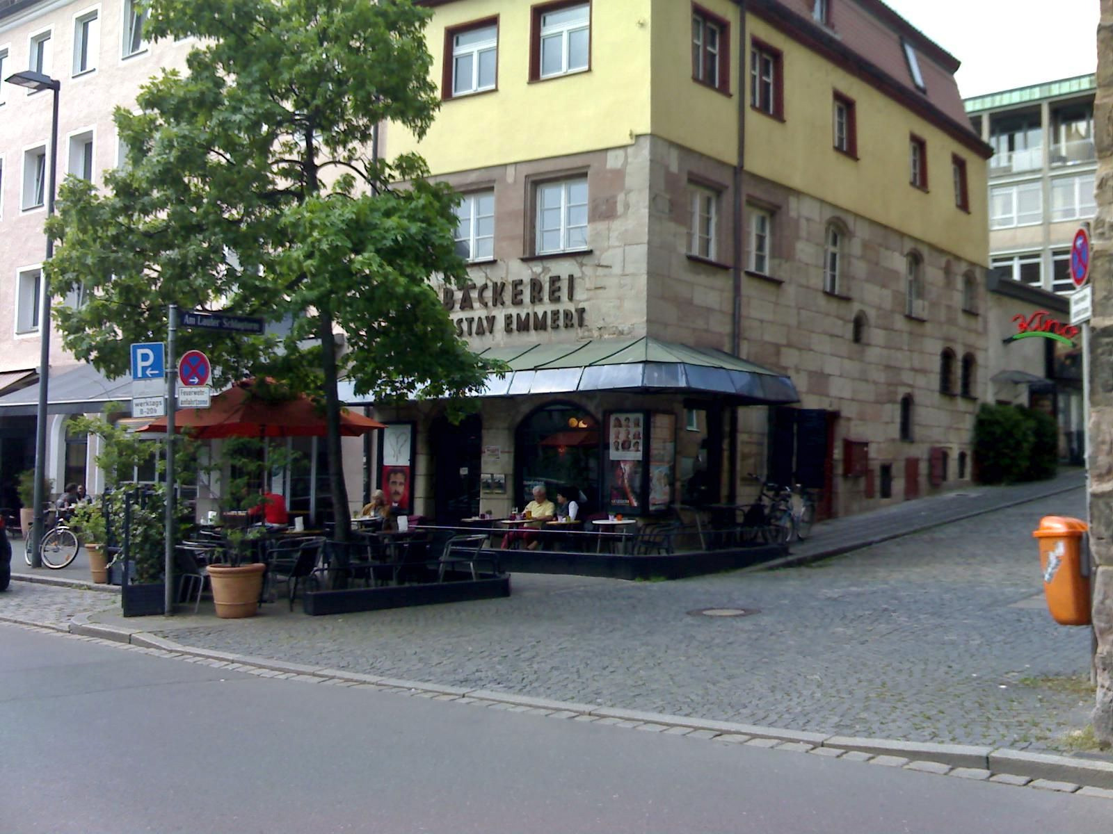 Kino und Cafe Meisengeige in der Inneren Laufer Gasse 3 in Nürnberg